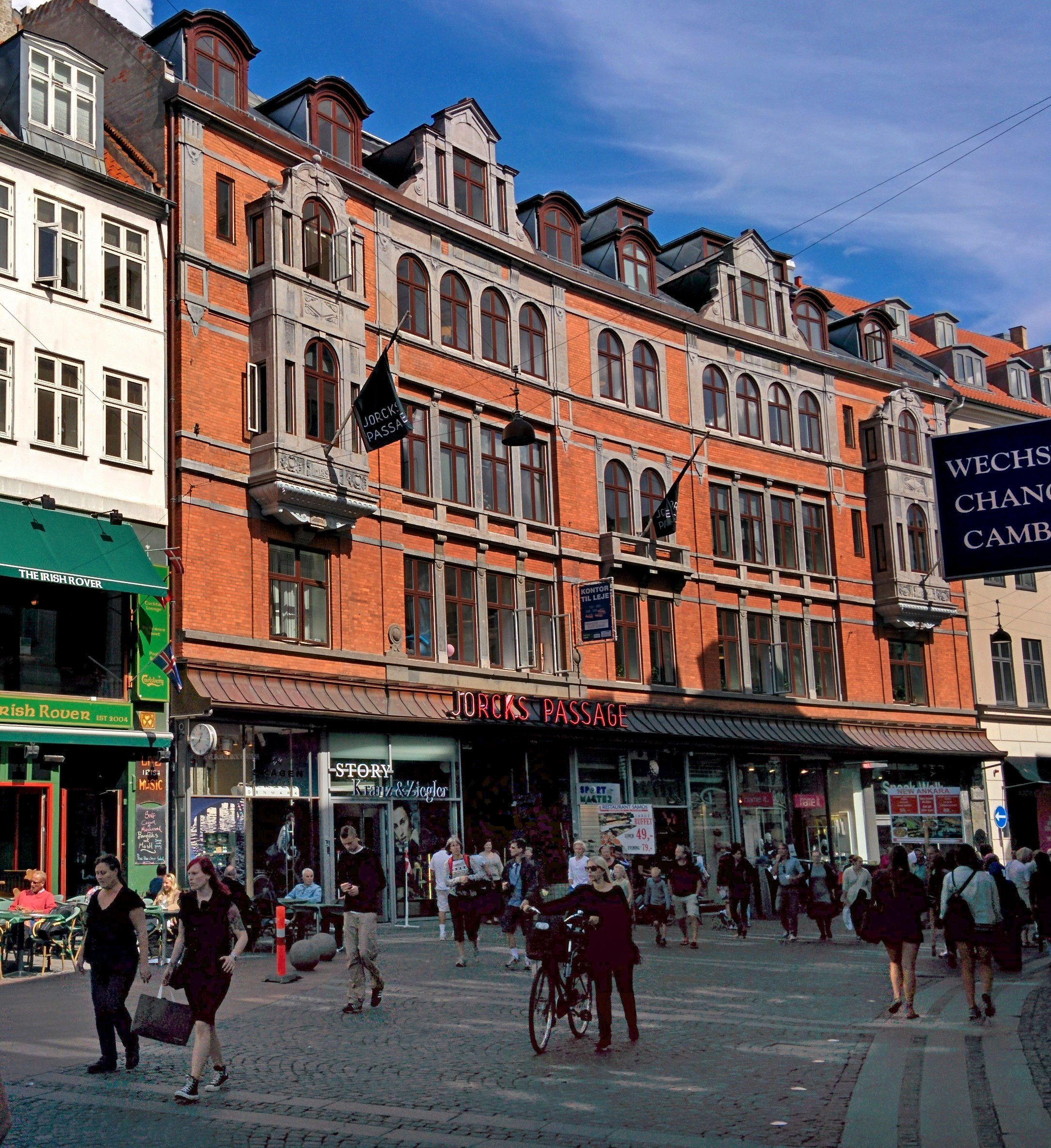 Vimmelskaftet - the Building with Jorcks Passage - as seen from Strøget in Copenhagen, Denmark